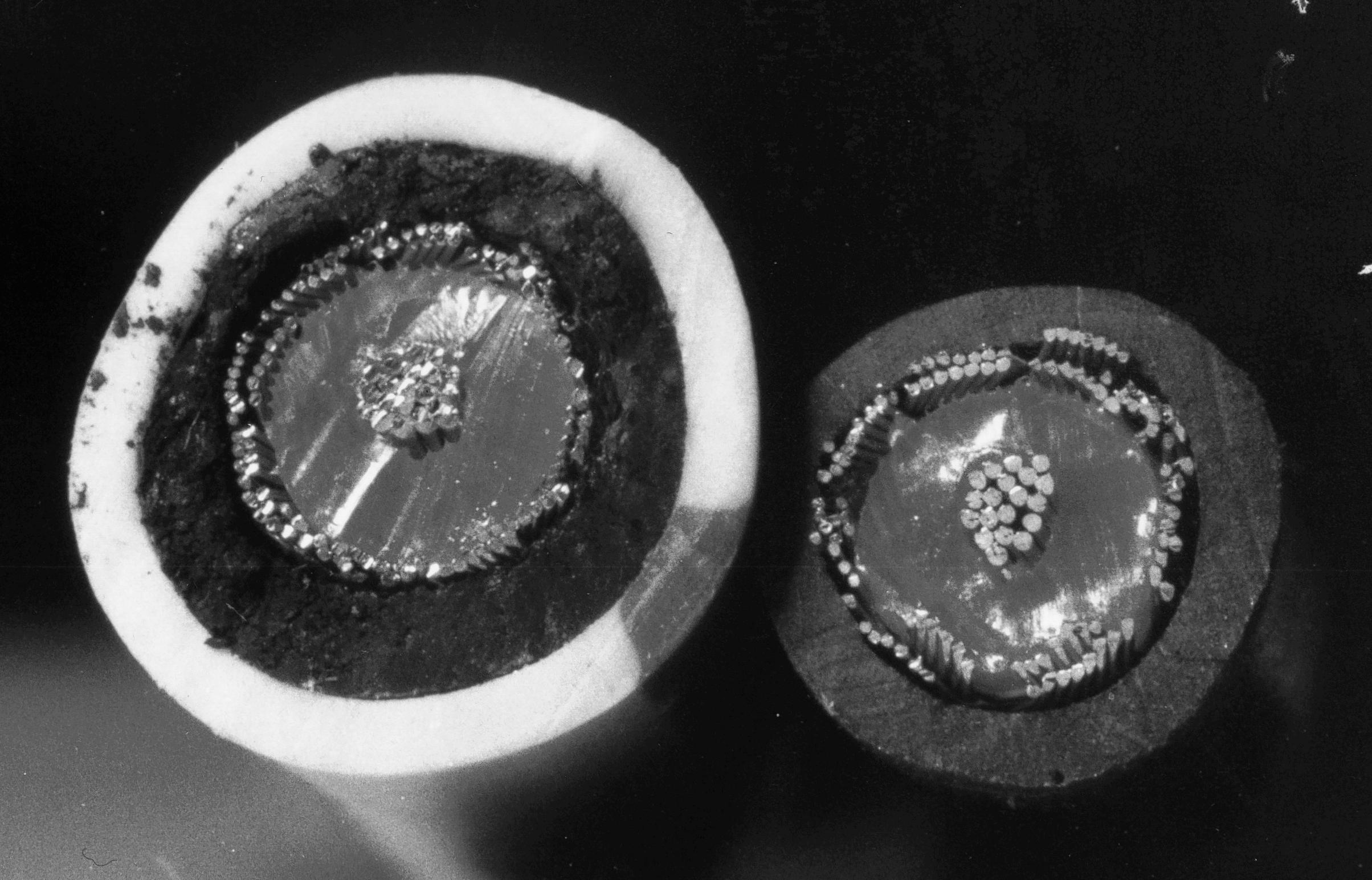 Cross Section of Ferrite Coated and Uncoated Coaxial Cable RG58